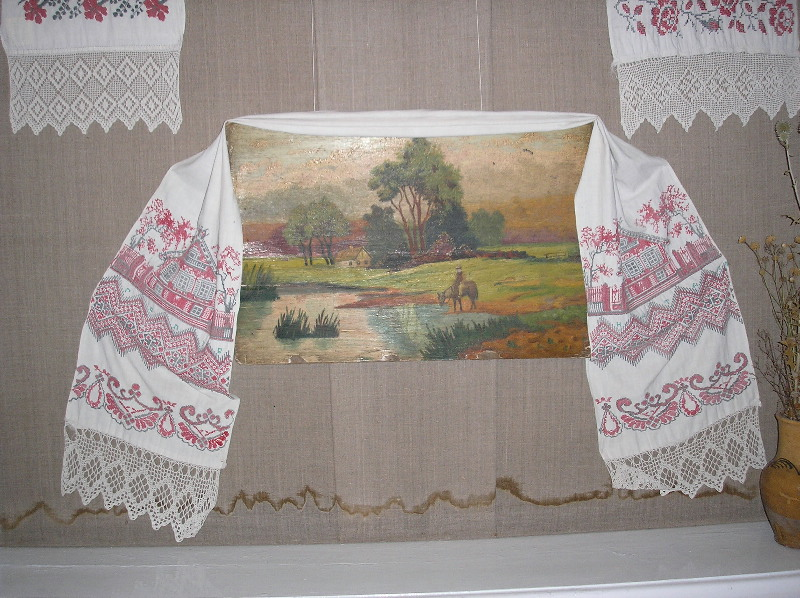 Village Prelesne. Ukraine. Donetsk region.